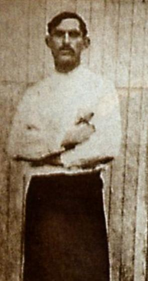 Fotografía de Abdón Porte, jugador uruguayo del Club Nacional de Football durante la década de 1910.